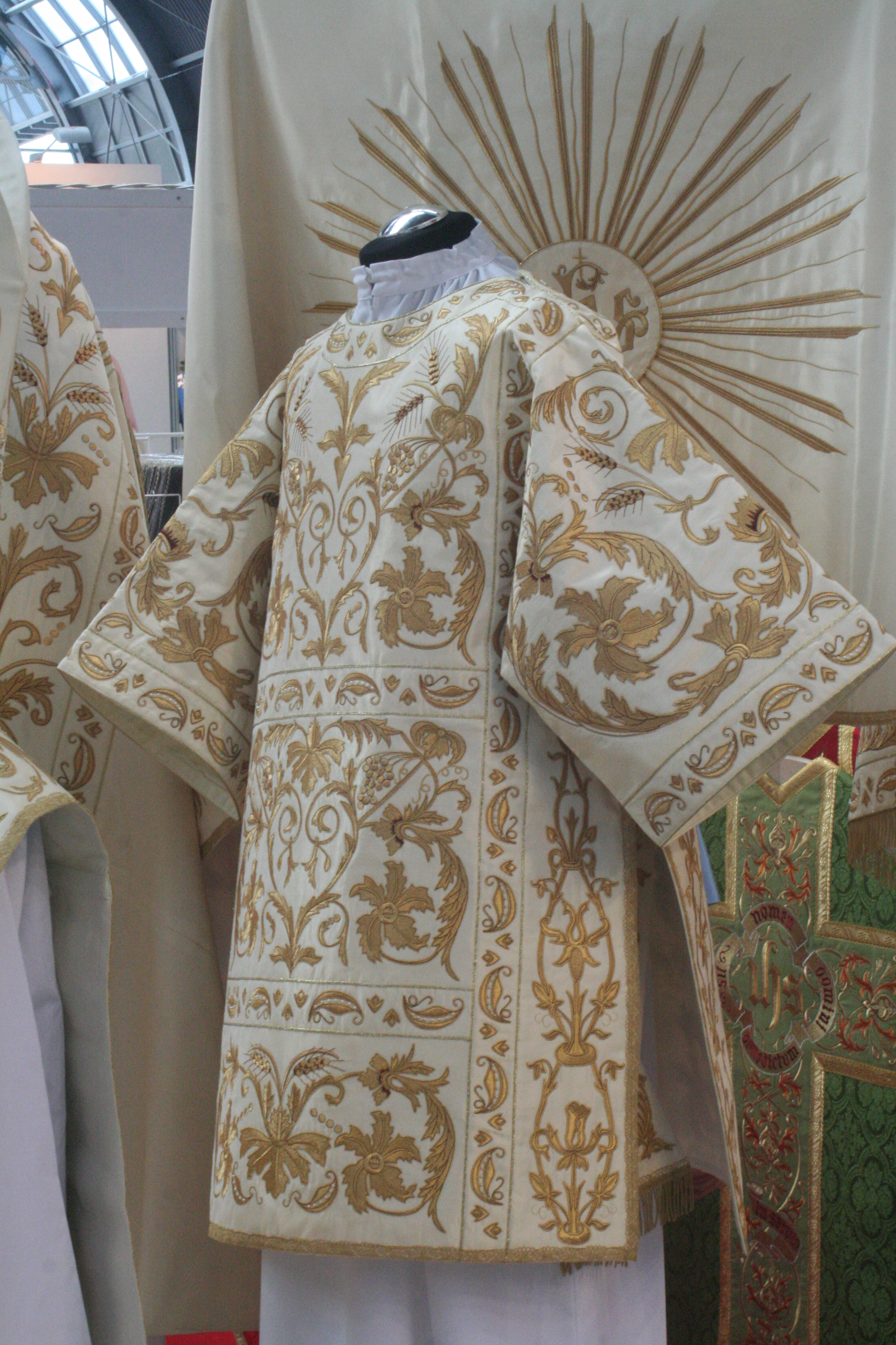 Ozdobna dalmatyka